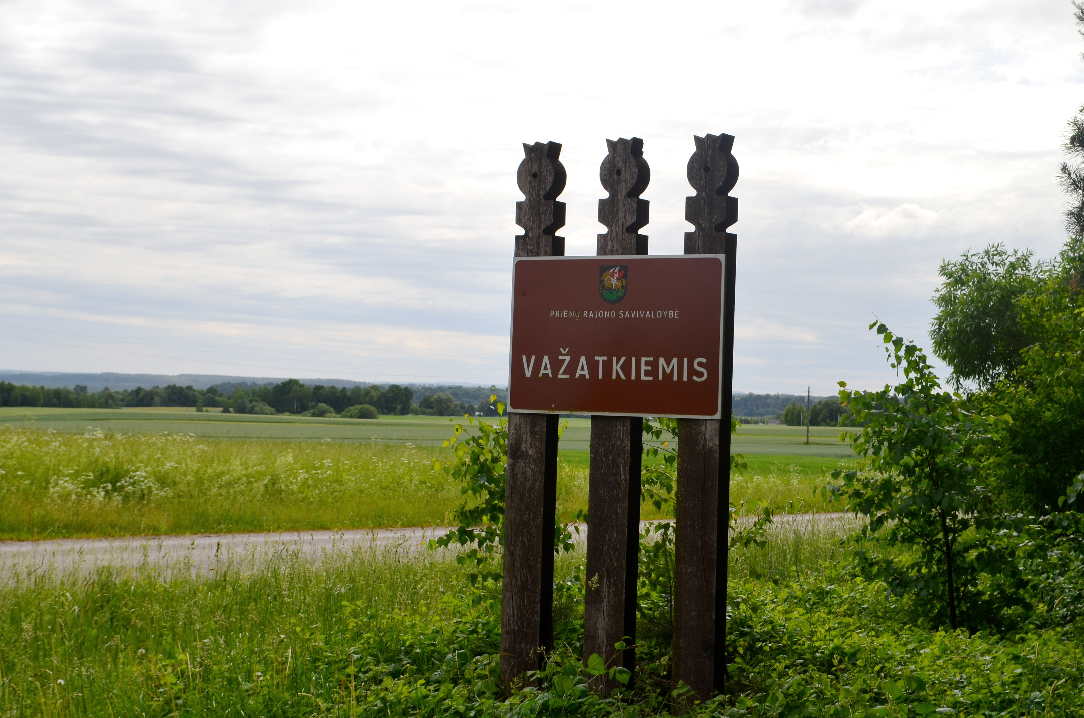 Važatkiemis, Prienų raj.